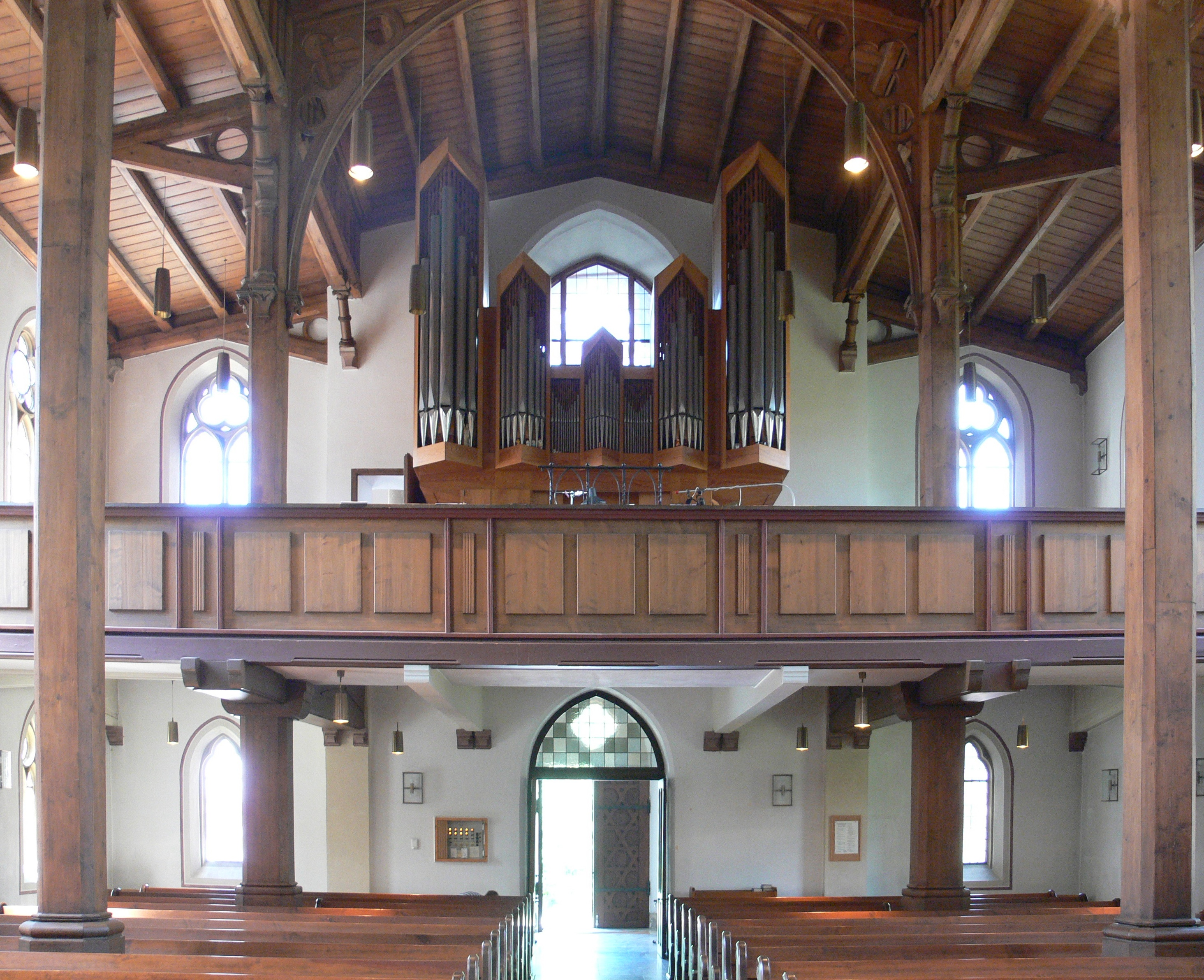 Weingarten (Württemberg), Evangelische Stadtkirche, Innenansicht mit Blick zur Weigle-Orgel op .1353 von 1981